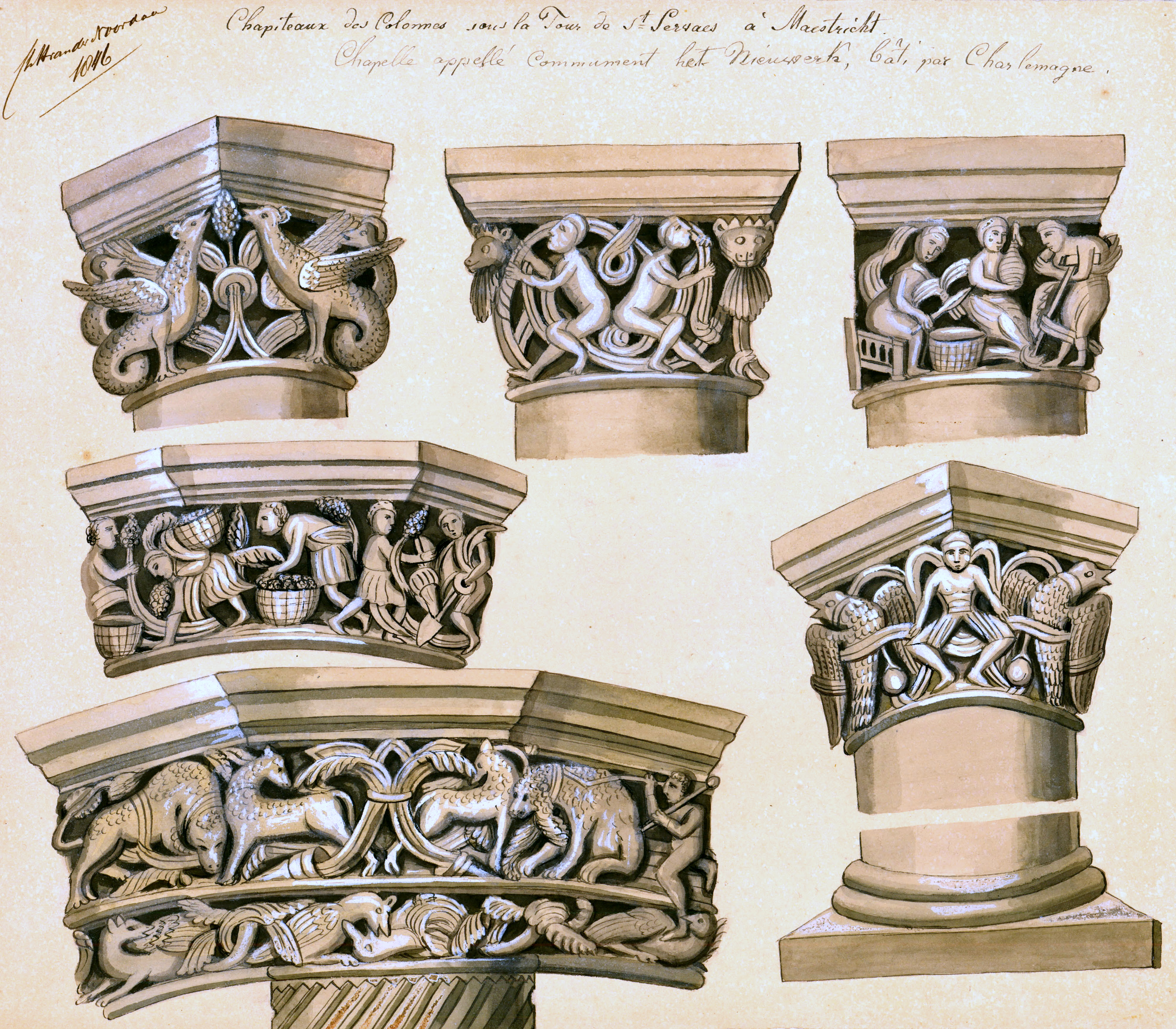 Ingekleurde tekening van Philippe van Gulpen van de gebeeldhouwde westwerkkapitelen in de Sint-Servaaskerk in Maastricht. Bijschrift: "Chapiteaux des Colonnes sous la Tour de St. Servaes à Maestricht. Chapelle appelé commument het Nieuwerk, bâti par Charlemagne". De kapitelen dateren uit de 12e eeuw en niet - zoals Van Gulpen dacht - uit de tijd van Karel de Grote. Collectie Van der Noordaa in het RHCL, Maastricht, CVDN 173.